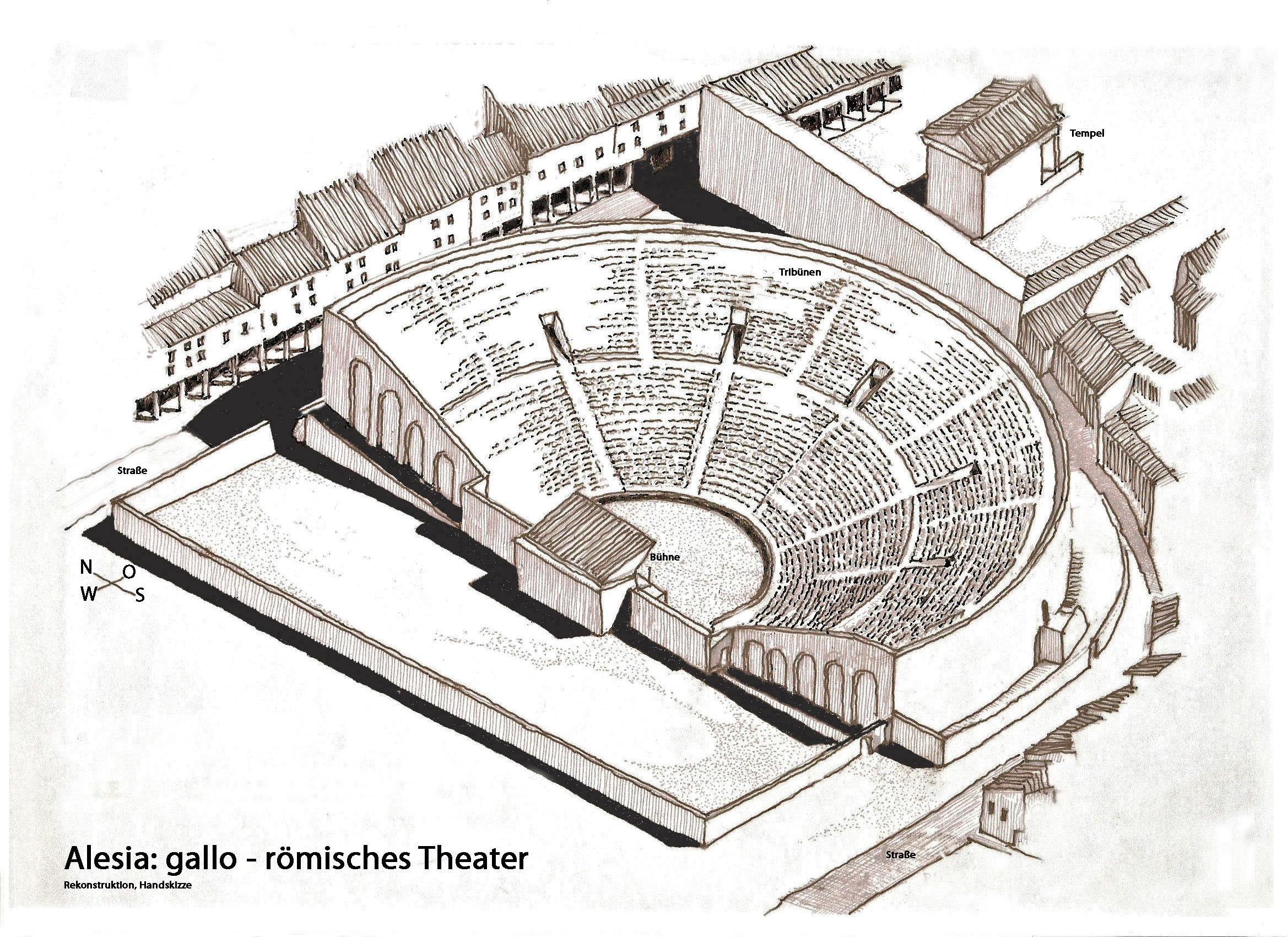 Alesia, gallo-römisches Theater, Rekonstruktion, Handskizze